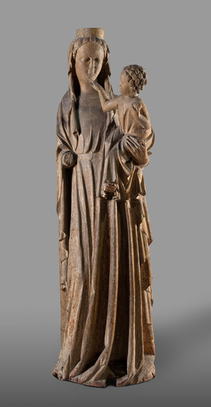 Madona s děckem Strakonická, Anonym - Čechy (kolem 1300-1320), jedlové dřevo se zbytky polychromie, výška 183 cm